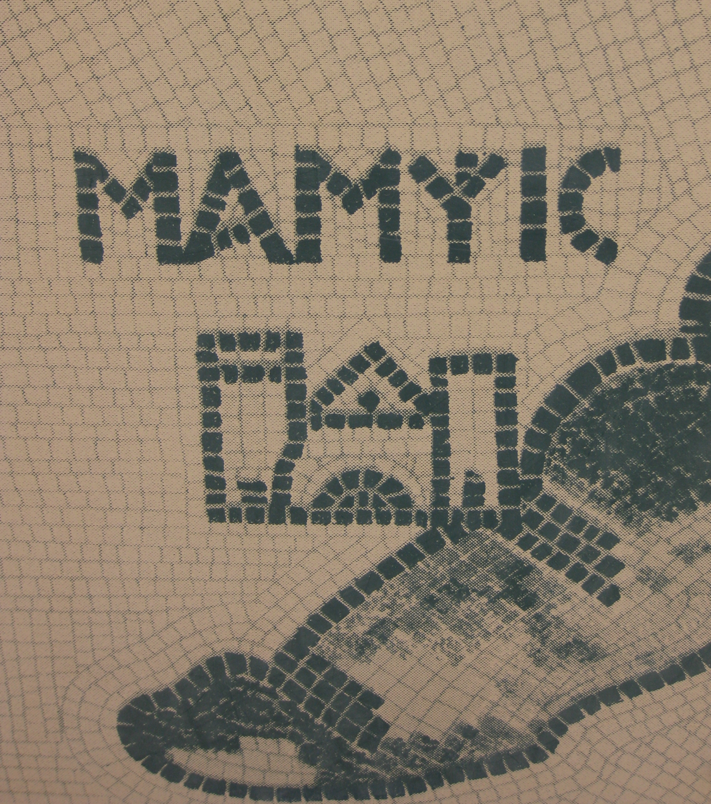 Mamshit ממשית